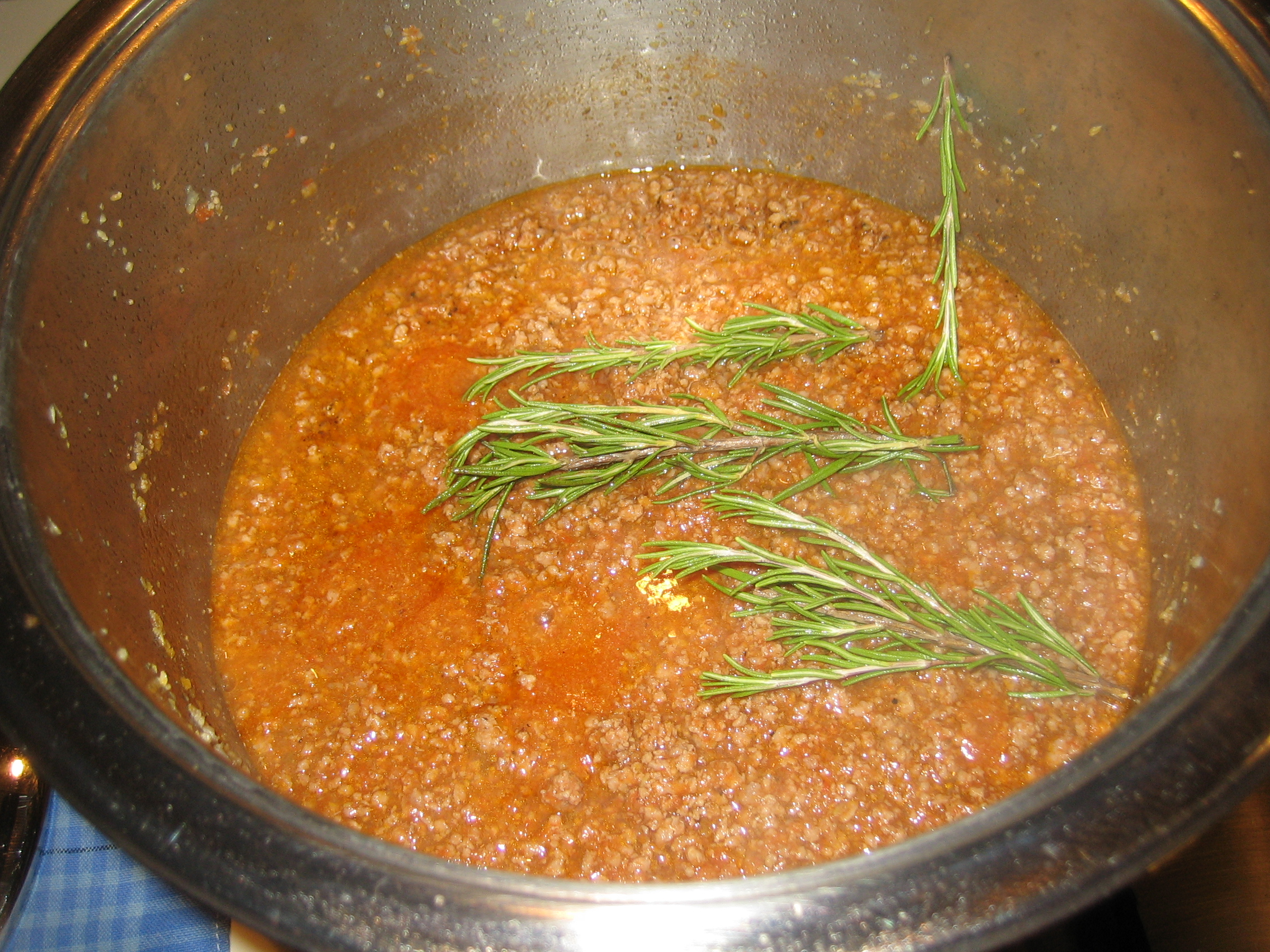 Preparazione ragù di carne/Aggiunta rosmarino